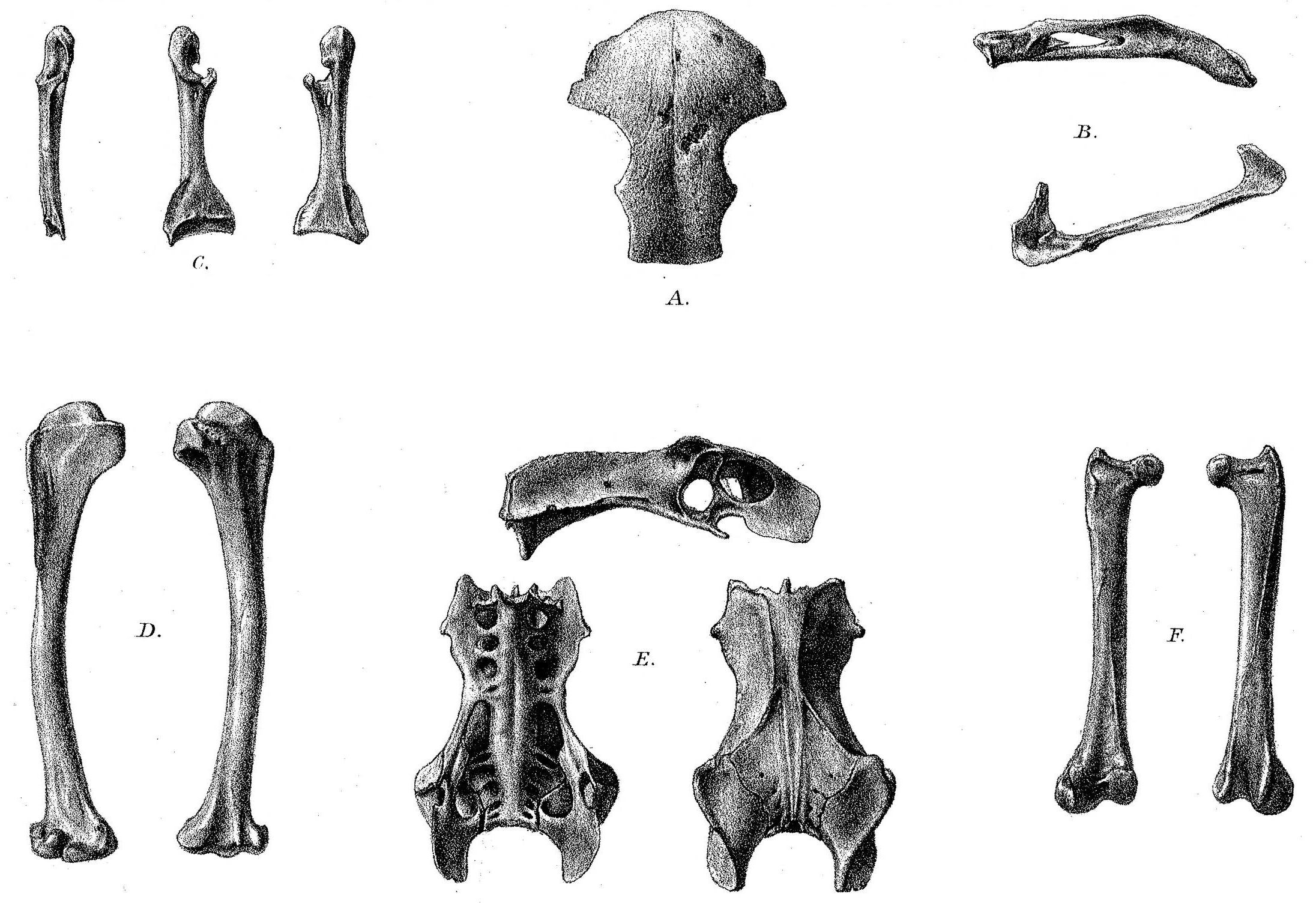 Rodrigues Owl fossils